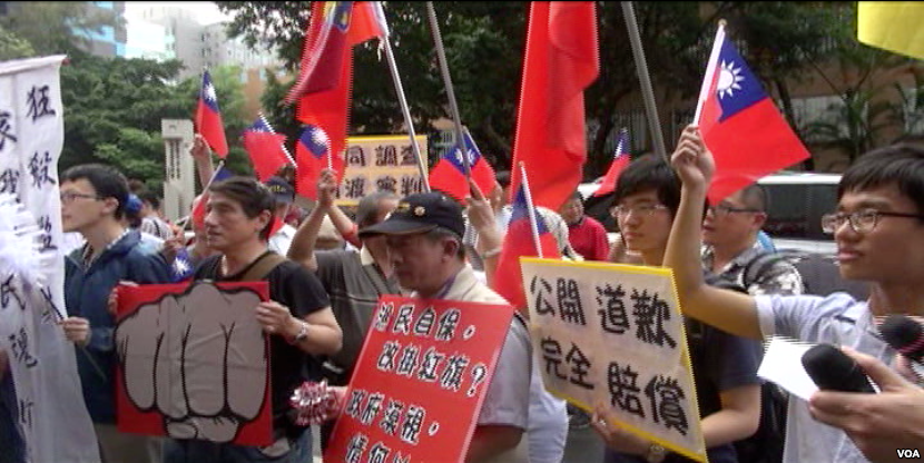 台湾民众抗议菲律宾射杀台湾渔民